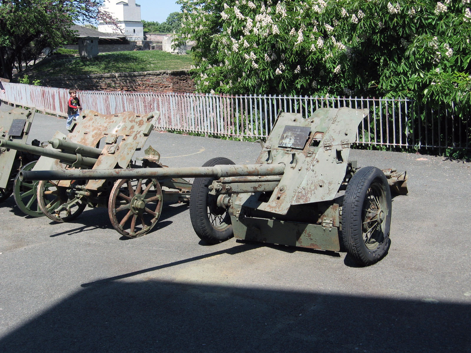 Russian M-42 45 mm AT gun, Belgrade Military Museum, Serbia.